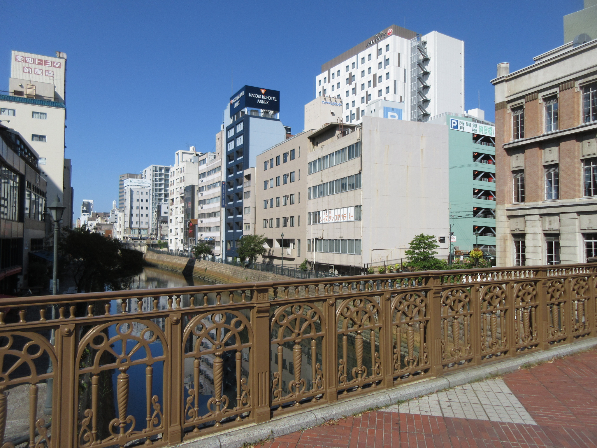 堀川にかかる納屋橋（名古屋市中村区）